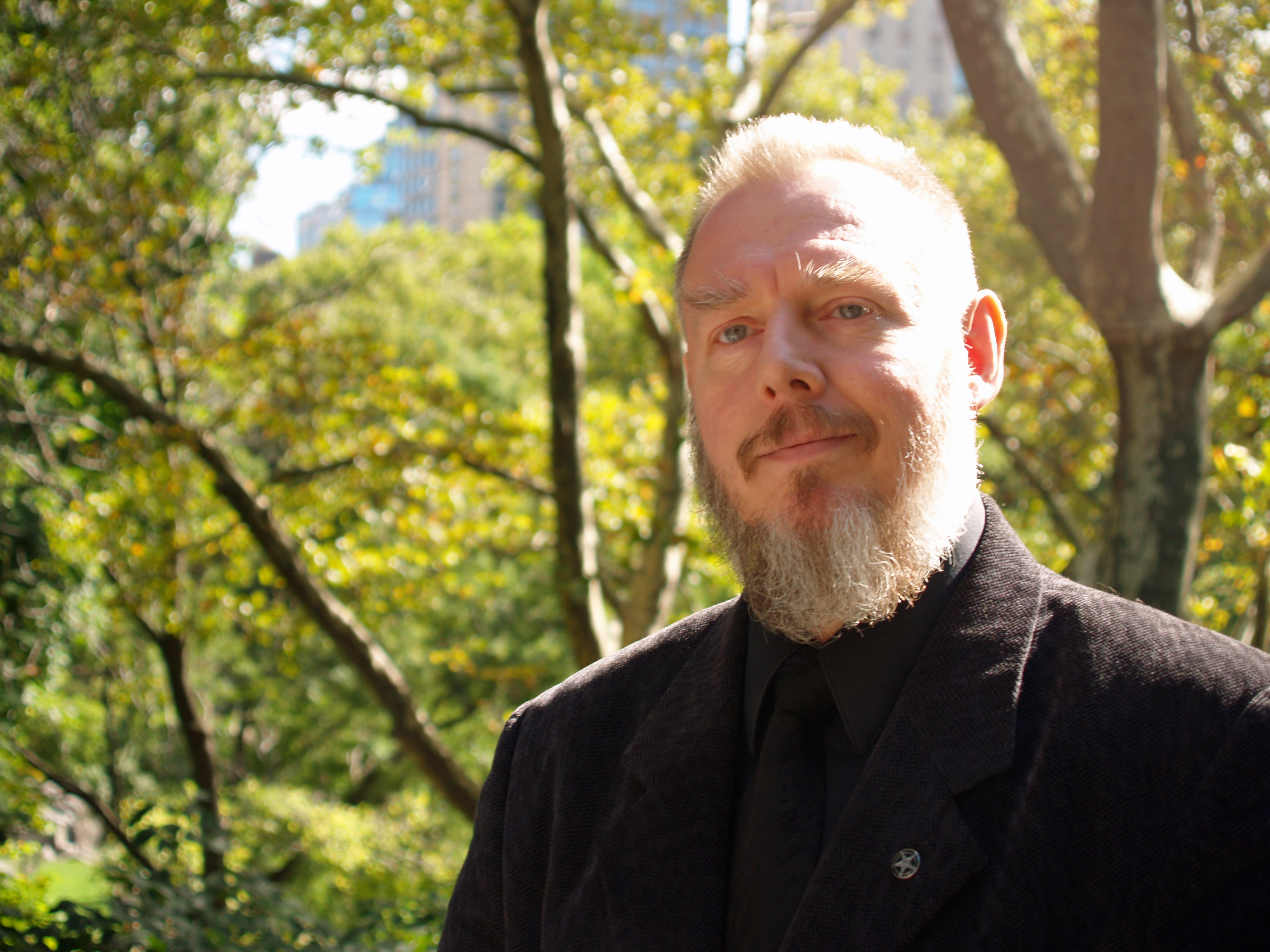 Peter H. Gilmore by David Shankbone